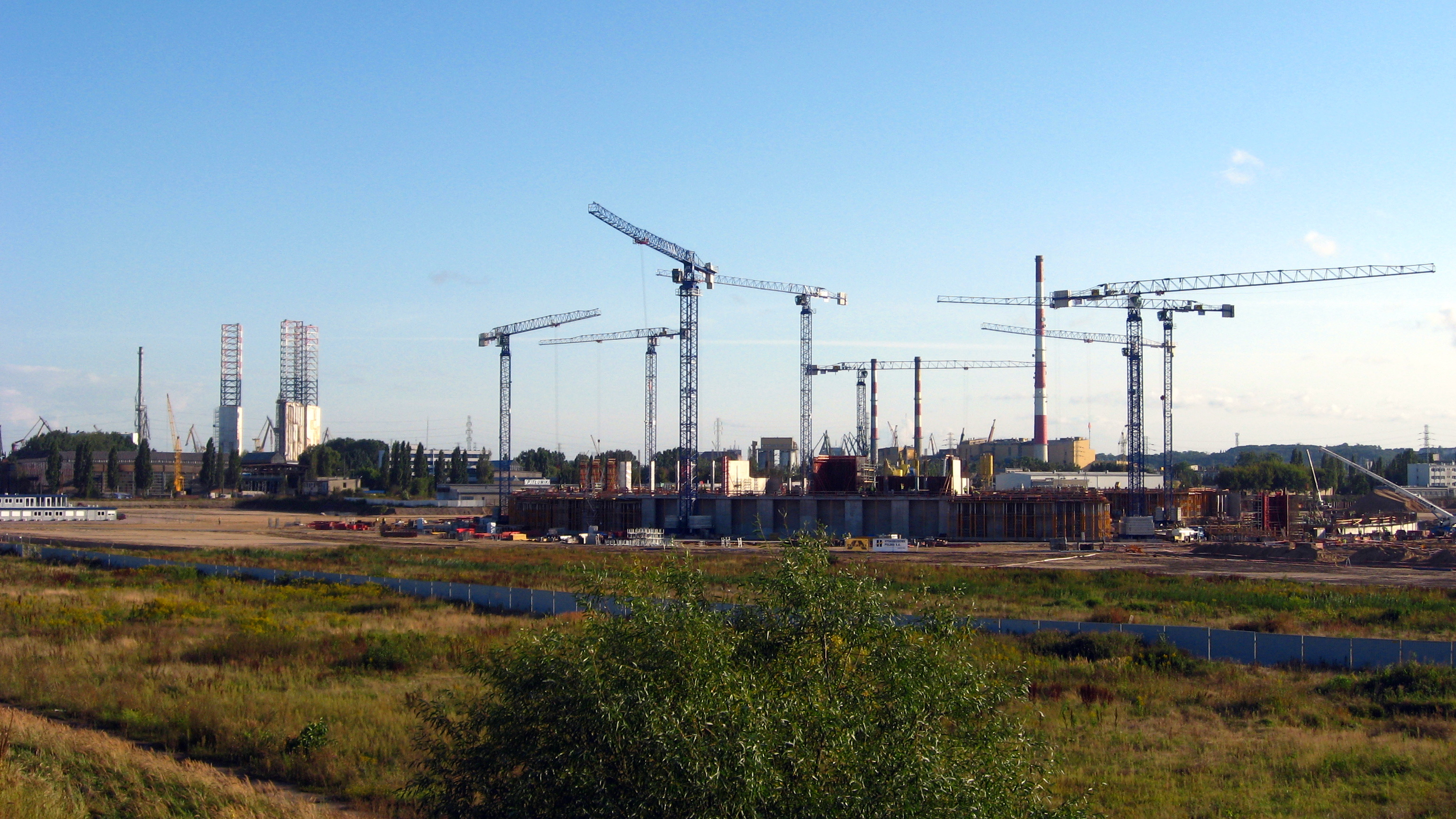 Stadion Baltic Arena w budowie, stan na wrzesień 2009